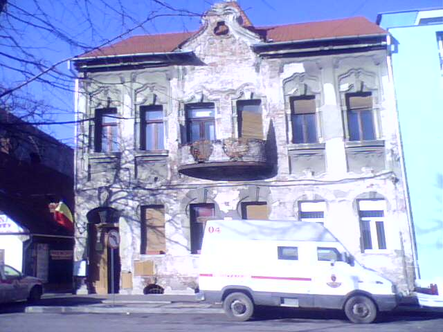 Casă din ARAD -1908.